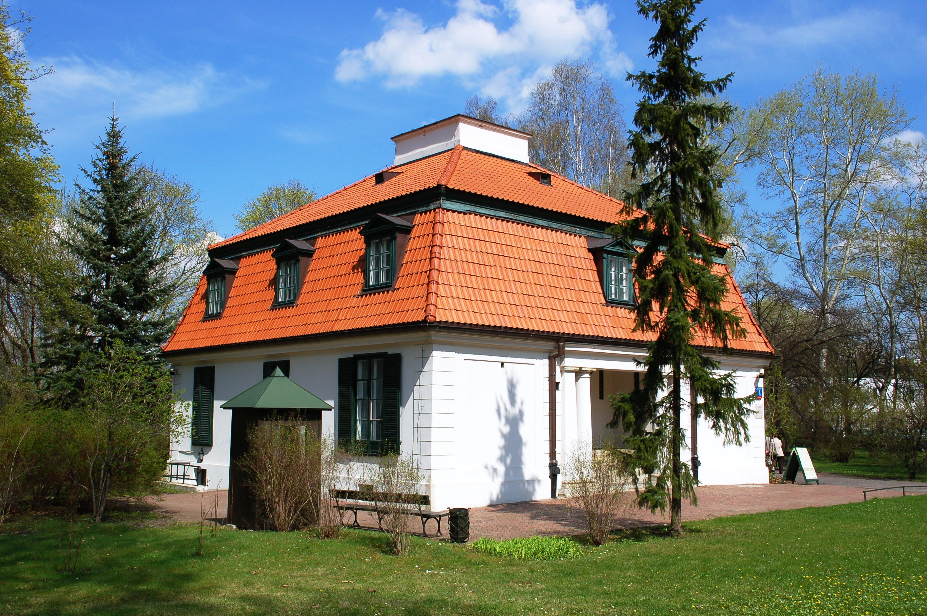 Ermitaż in Warschau